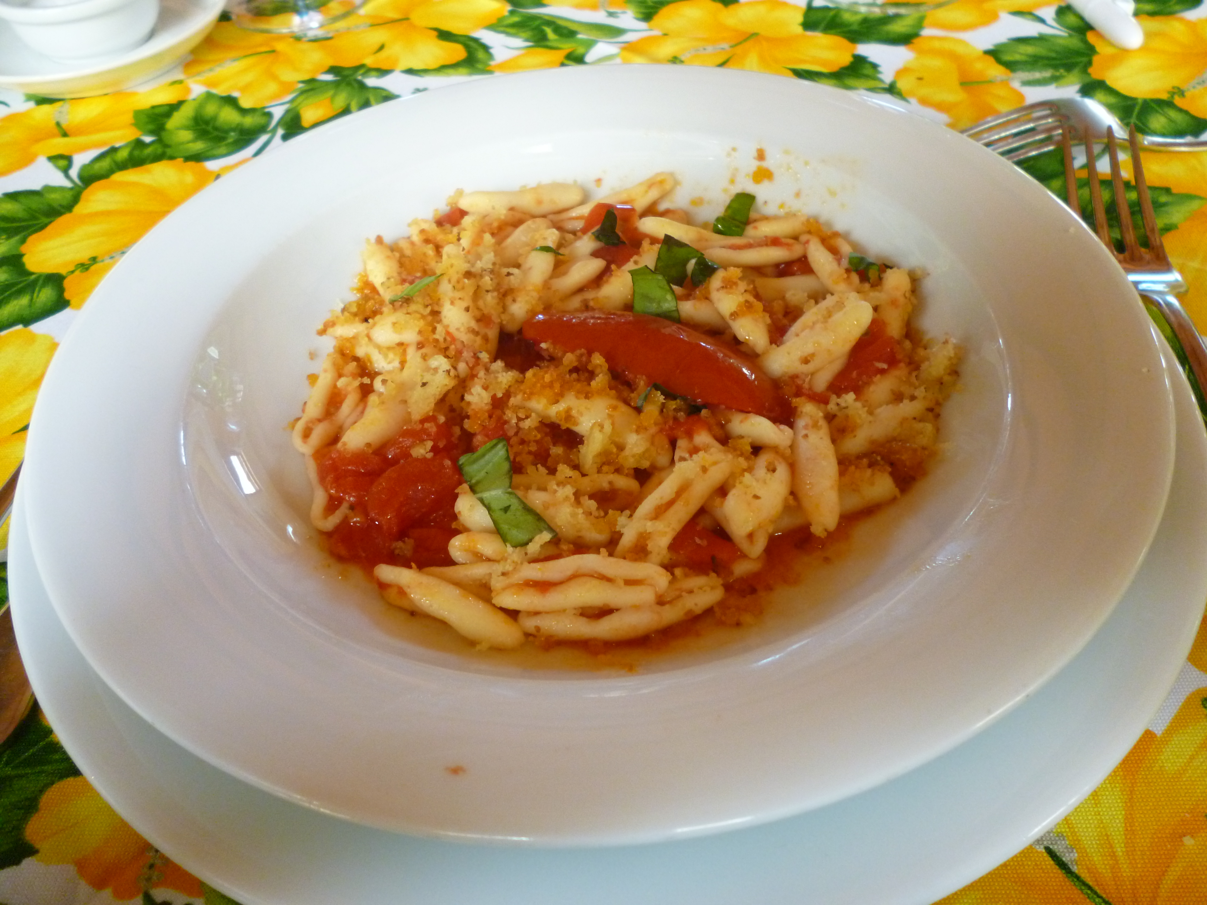 אגרוטוריסמו